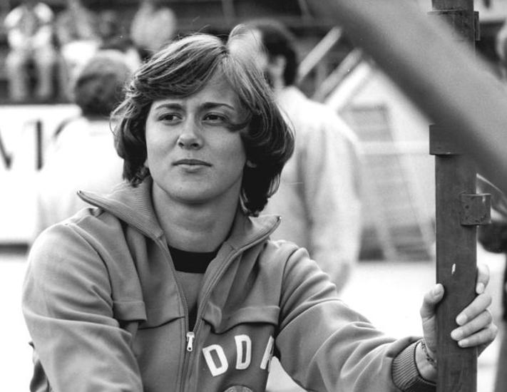 Marlies Göhr-Ölsner ADN-ZB Demme 28.5.78 Erfurt: Klubpokal-Vorrunde der DDR-Leichtathleten in Erfurt - Einen guten Start in die neue Saison hatte auch Sprintweltrekordlerin Marlies Göhr-Oelsner, die die 100 m in 11,15 s für sich entschied - Foto von einem früheren Wettkampf.